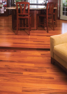 flooring jatobá wood